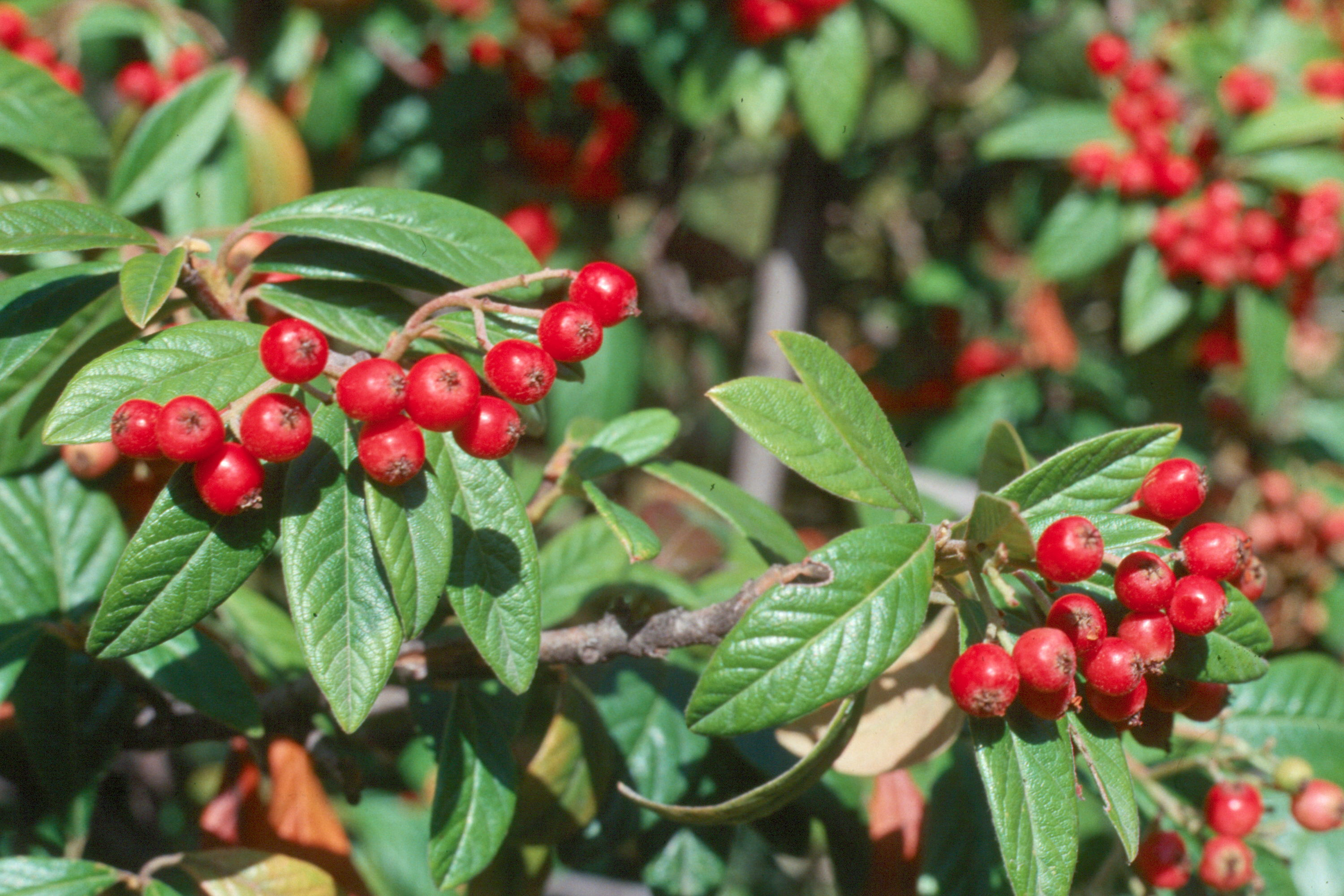 Cotoneaster x watereri, frutos. Real Jardín Botánico de Madrid.